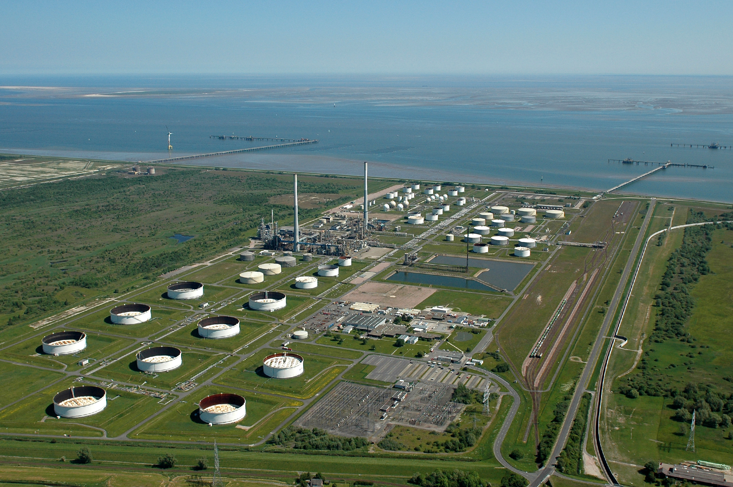 Fotoflug vom Flugplatz Nordholz-Spieka über Cuxhaven und Wilhelmshaven Die ehemalige Raffinerie Wilhelmshaven, gesehen von Westen